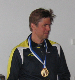 Mati Preitof 2009. aasta rogaini EMi autasustamisel